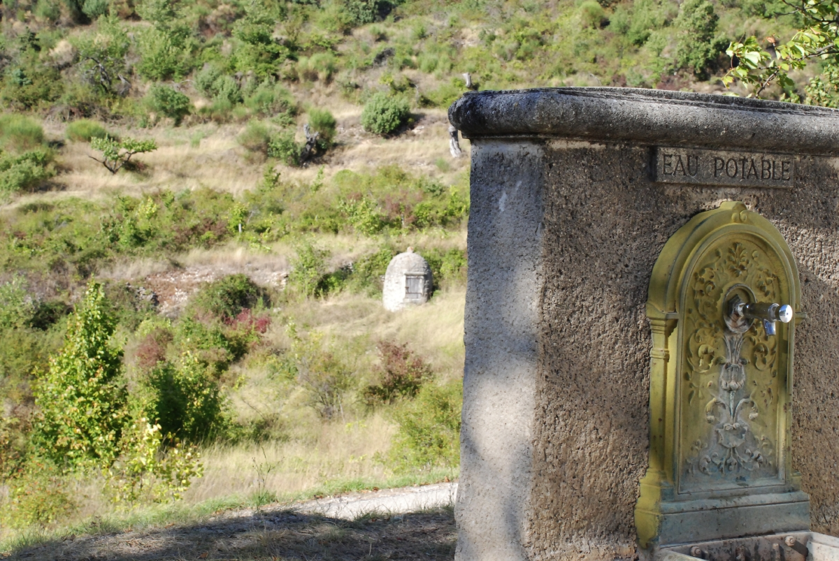 Montbrun-les-Bains (Drôme, France). Fontaines. Beffroi.